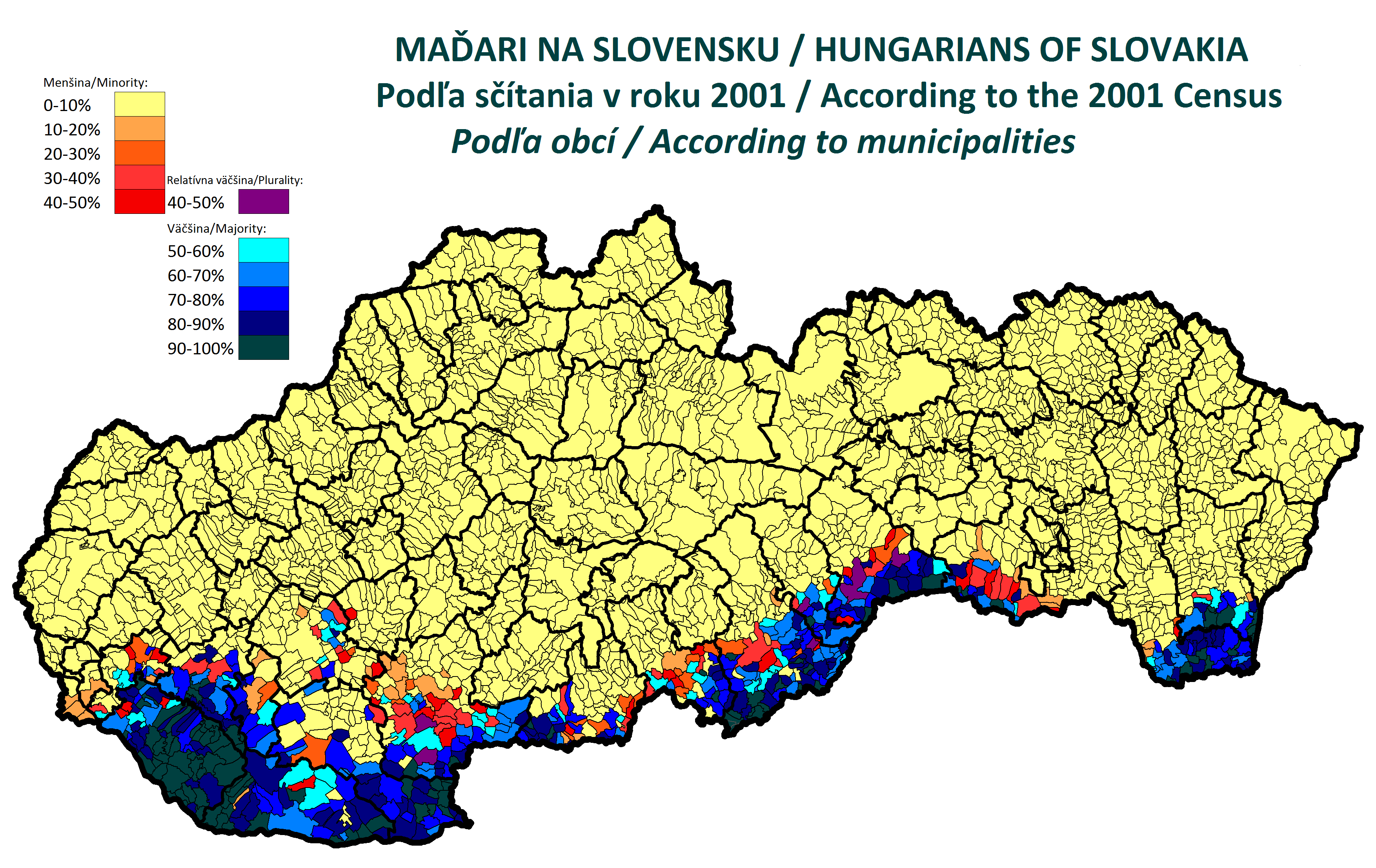 Maďarská národnosť v obciach Slovenskej republiky, podľa sčítania v roku 2001.